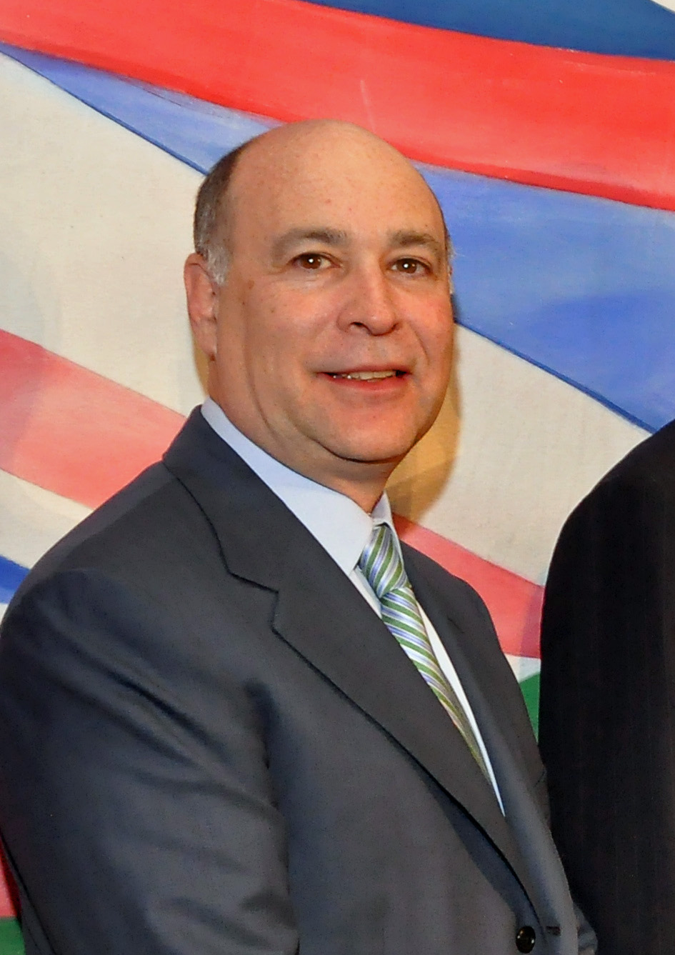 Robert Steven Kapito, 2010, als Gast bei der Preisverleihung des Woodrow Wilson Awards an Laurence Douglas Fink.